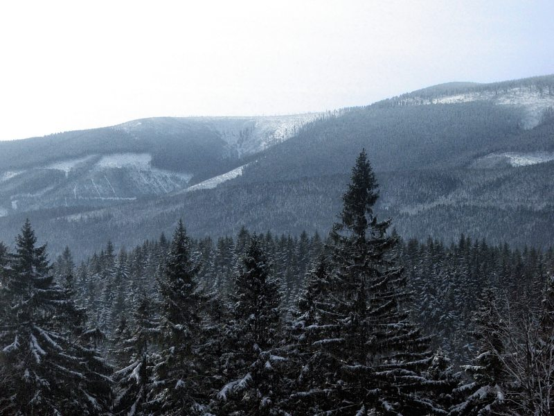 Masyw Śnieżnika od strony czeskiej, widok na Puchacz, Przełęcz Puchacza i Goworek